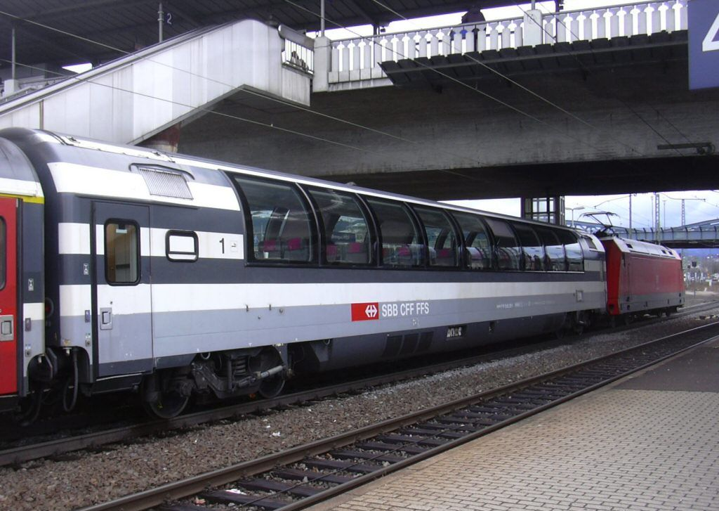 Panoramawagen Apm 61 85 19-90 109-3 der SBB in Freiburg im Breisgau